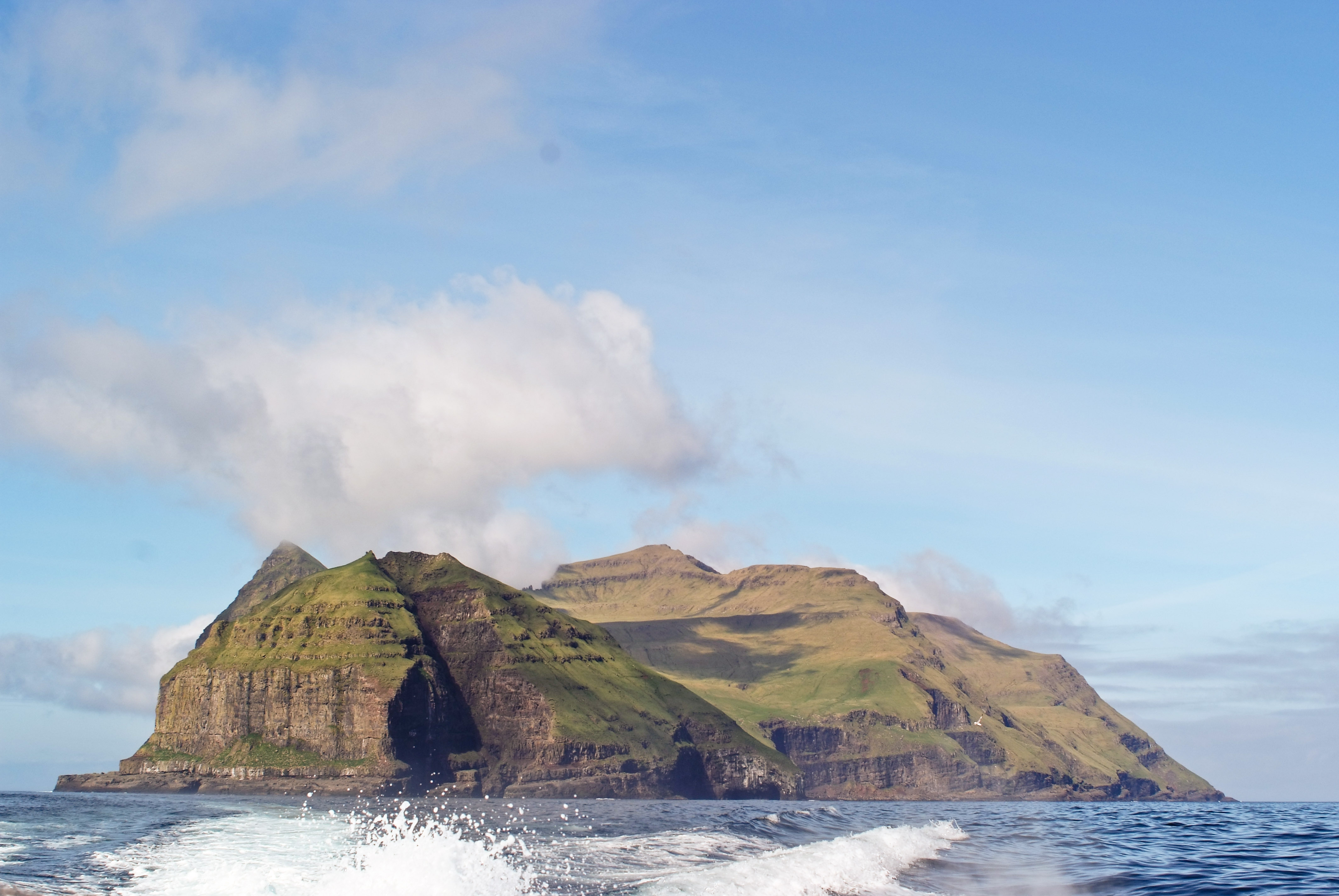 Mykines from Sørvágsfjørður.